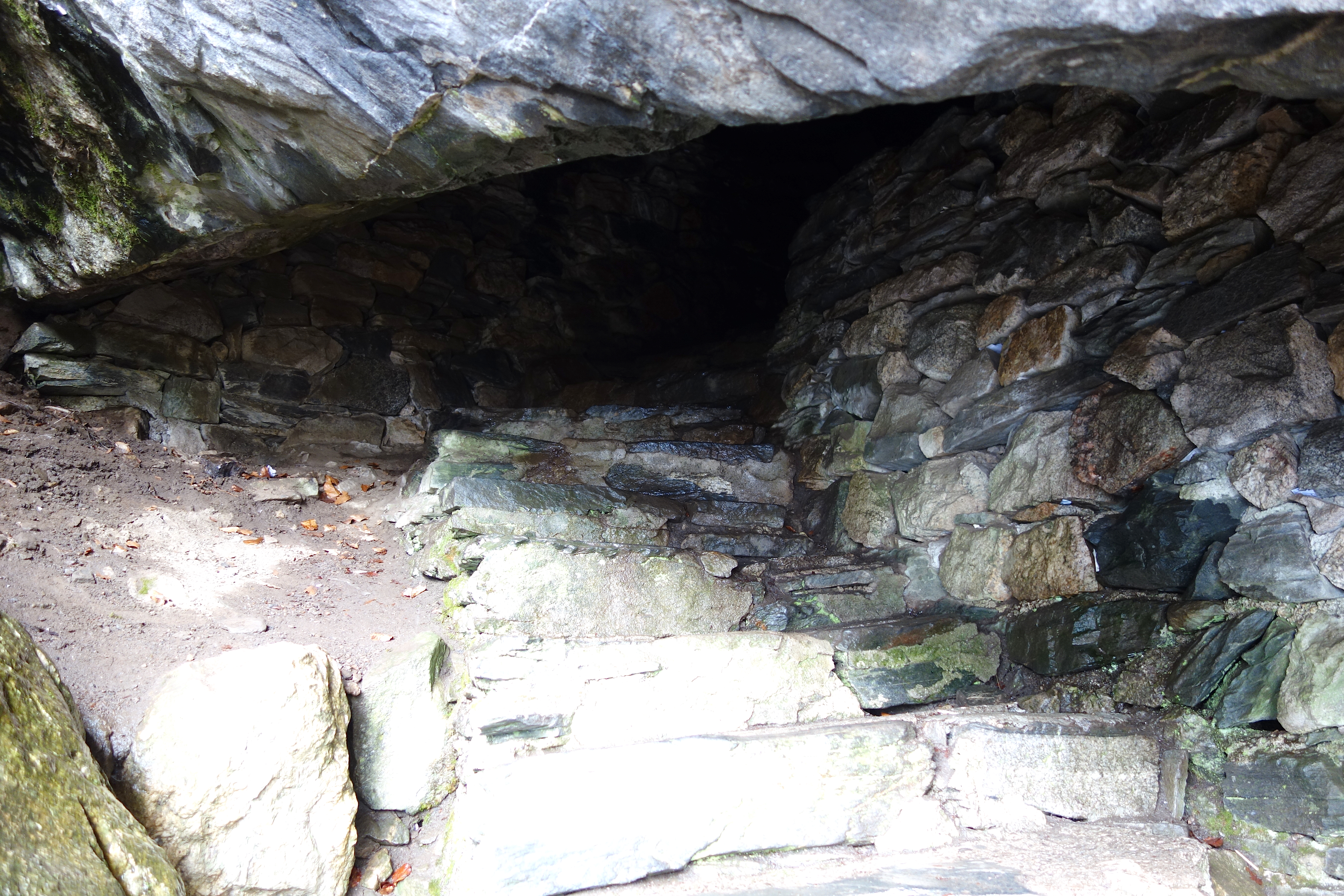 Grotte où aurait vécu Jean de Rila après s'être retiré du monastère de Rila - entrée de la grotte